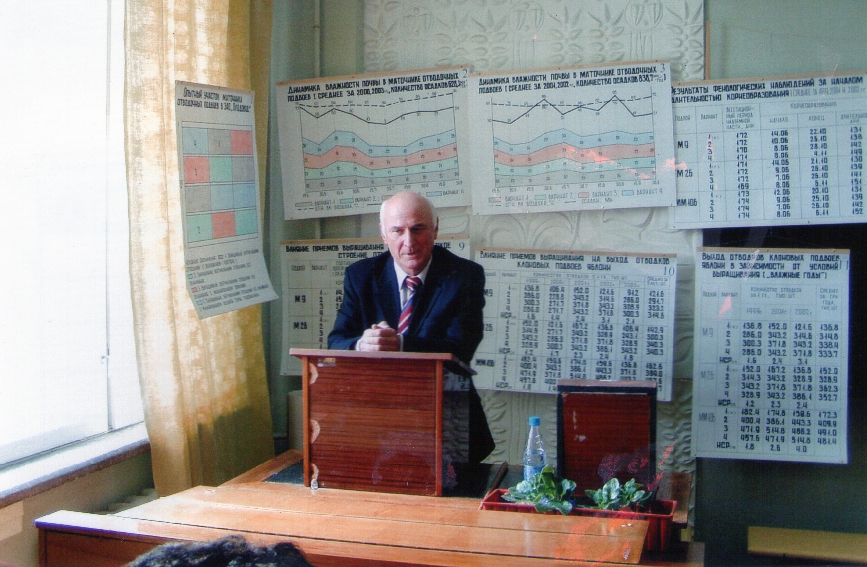 Гегечкори Б. С. выступает с докладом на защите докторской диссертации. Декабрь 2020 г.